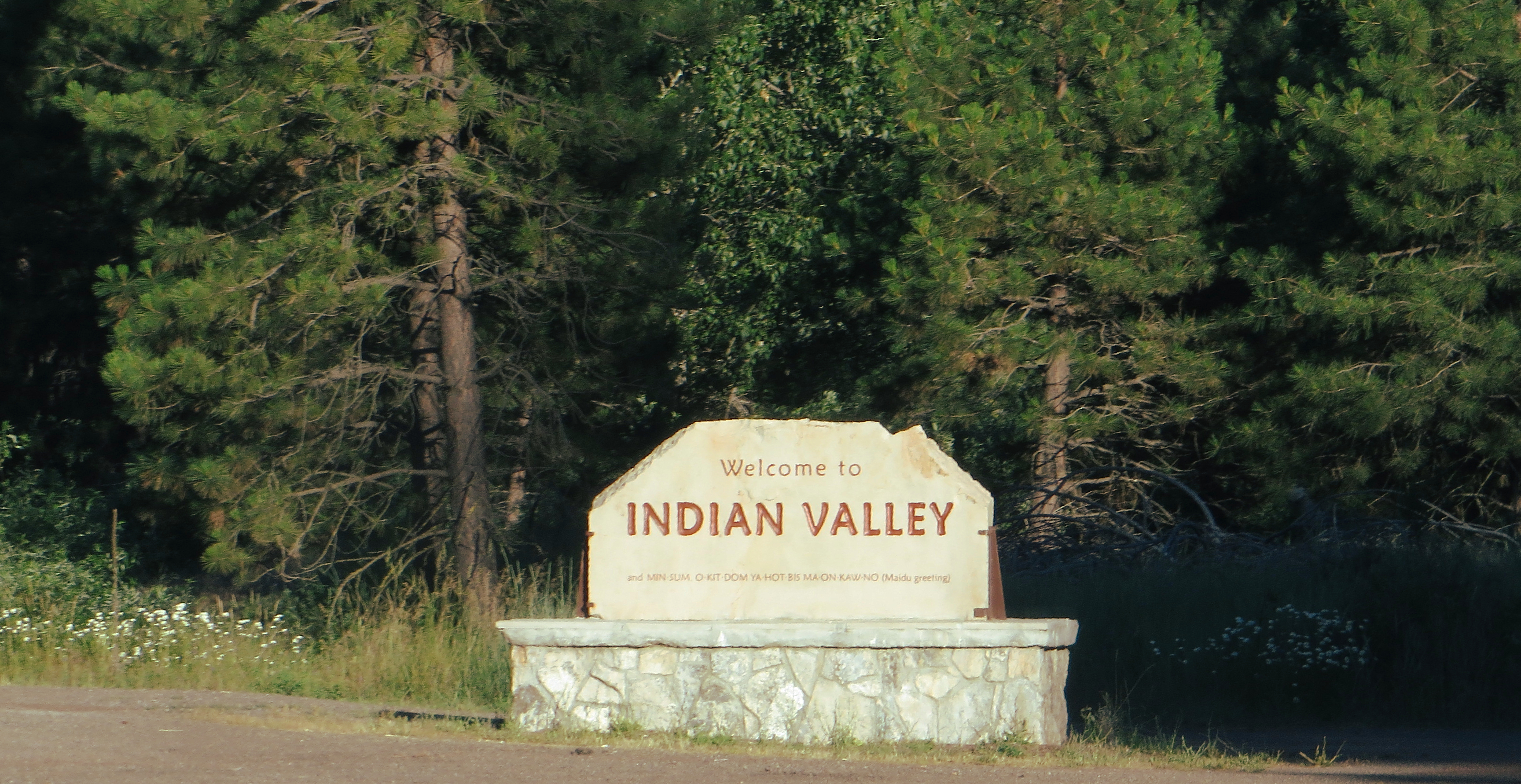 Maidu greeting on sign